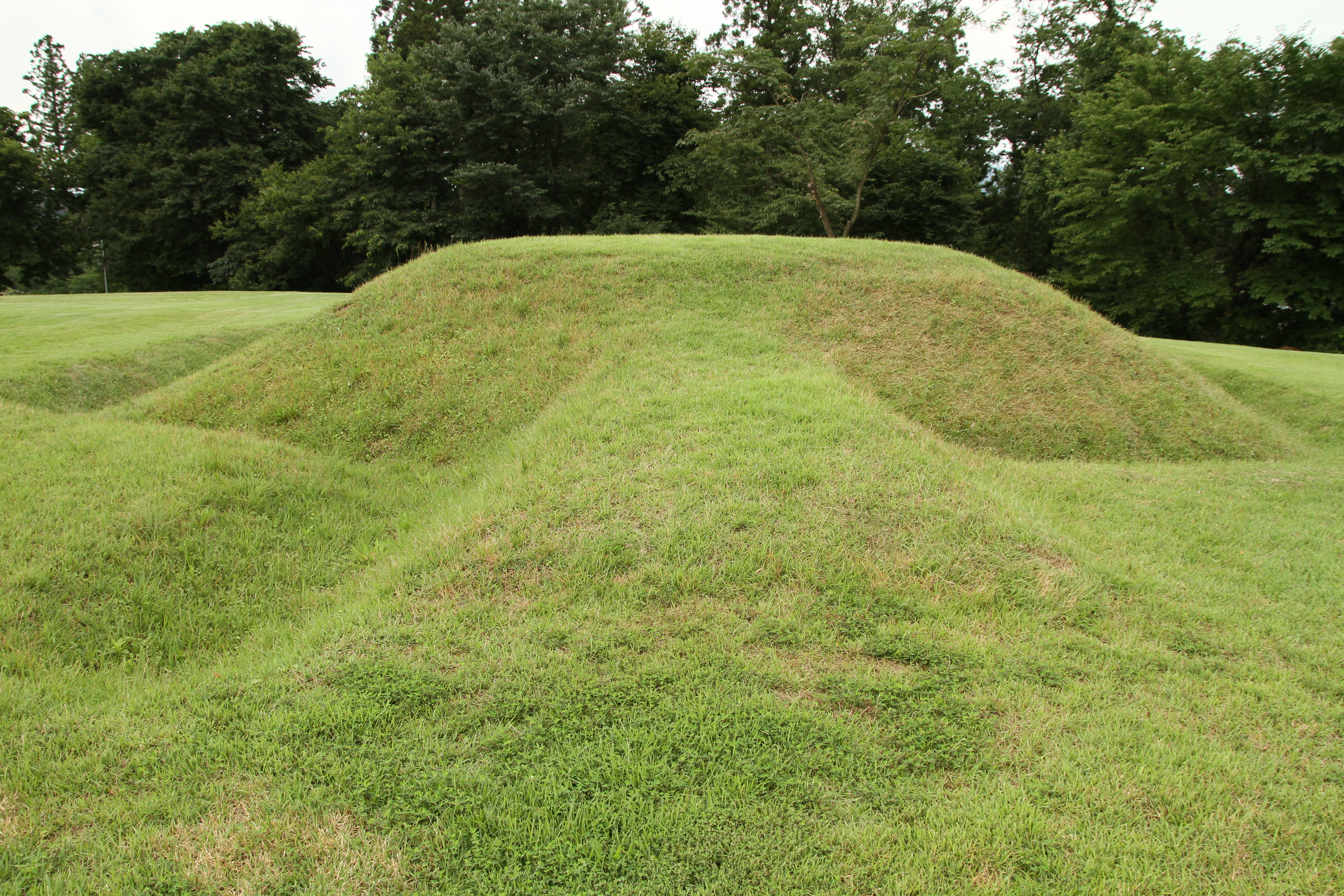 古津八幡山遺跡の前方後方形周溝墓